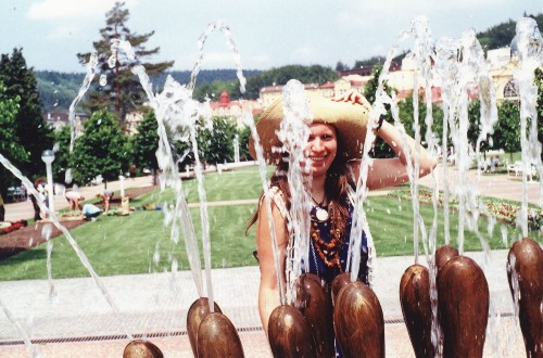 Foto der Lyrikerin und Märchenautorin Agnieszka Haupe- Kalka